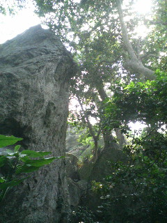 世界遺産《「神宿る島」宗像・沖ノ島と関連遺産群》- 沖ノ島の祭祀遺跡がある磐座（岩陰祭祀の7・8号遺構があるD号巨石を側面から見る）、2007年度現地大祭参加時に撮影 UNESCO World Heritage 《Sacred Island of Okinoshima and Associated Sites in the Munakata Region》- Okitsumiya, Okinoshima